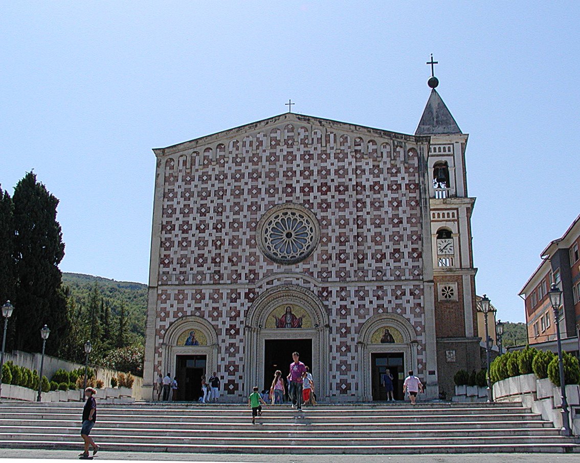 die Kirche